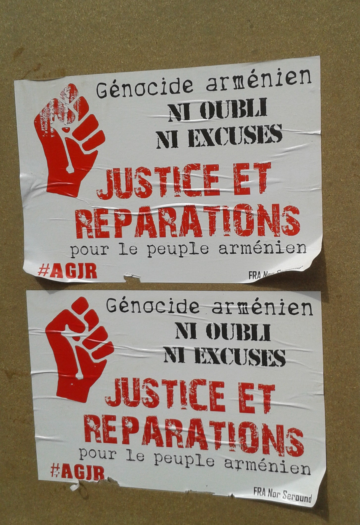 Affiche apposée sur un mur de Paris, à l'occasion du centenaire du génocide arménien